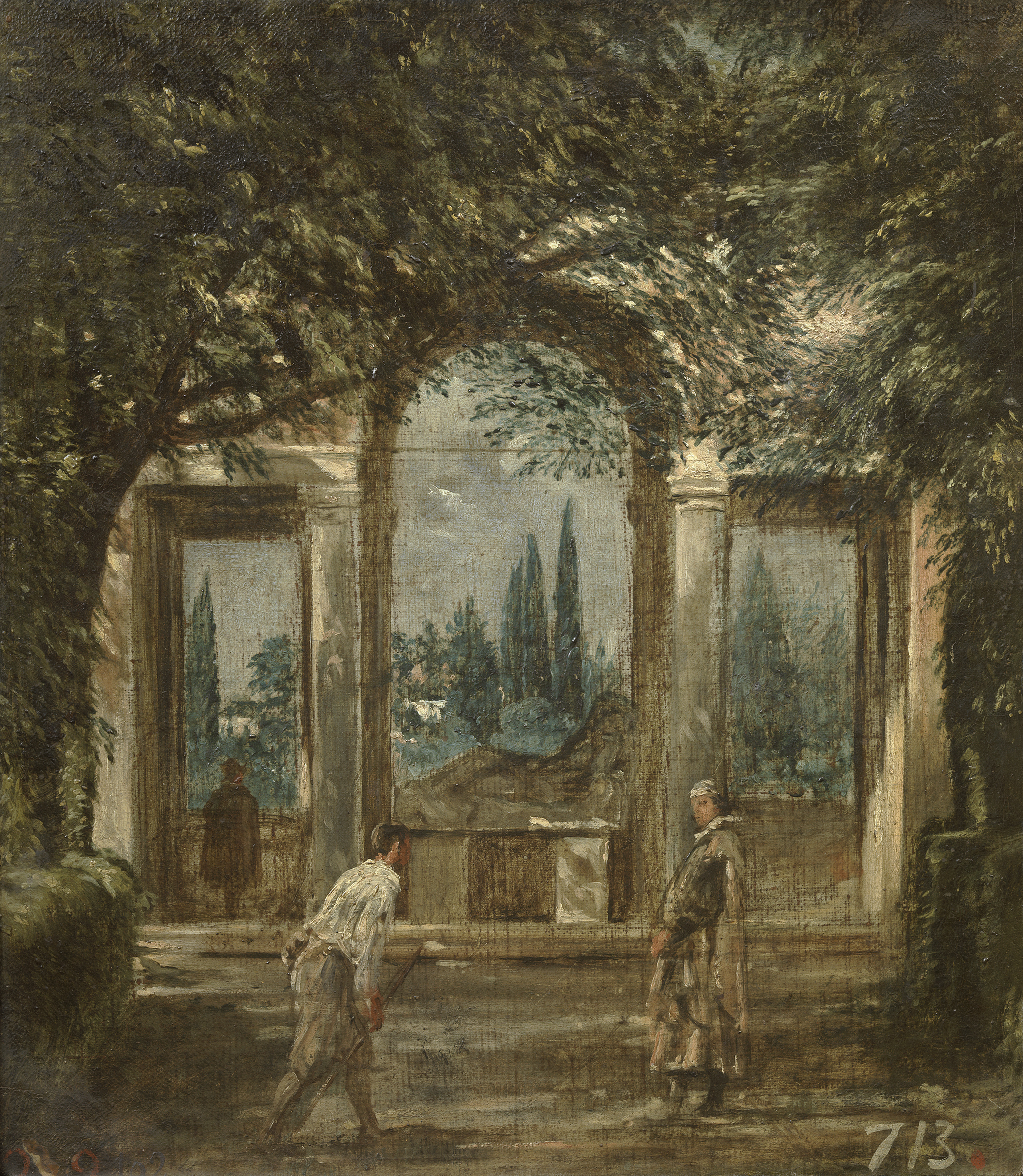 La obra representa el jardín de la Villa Médici de la ciudad de Roma, (Italia).